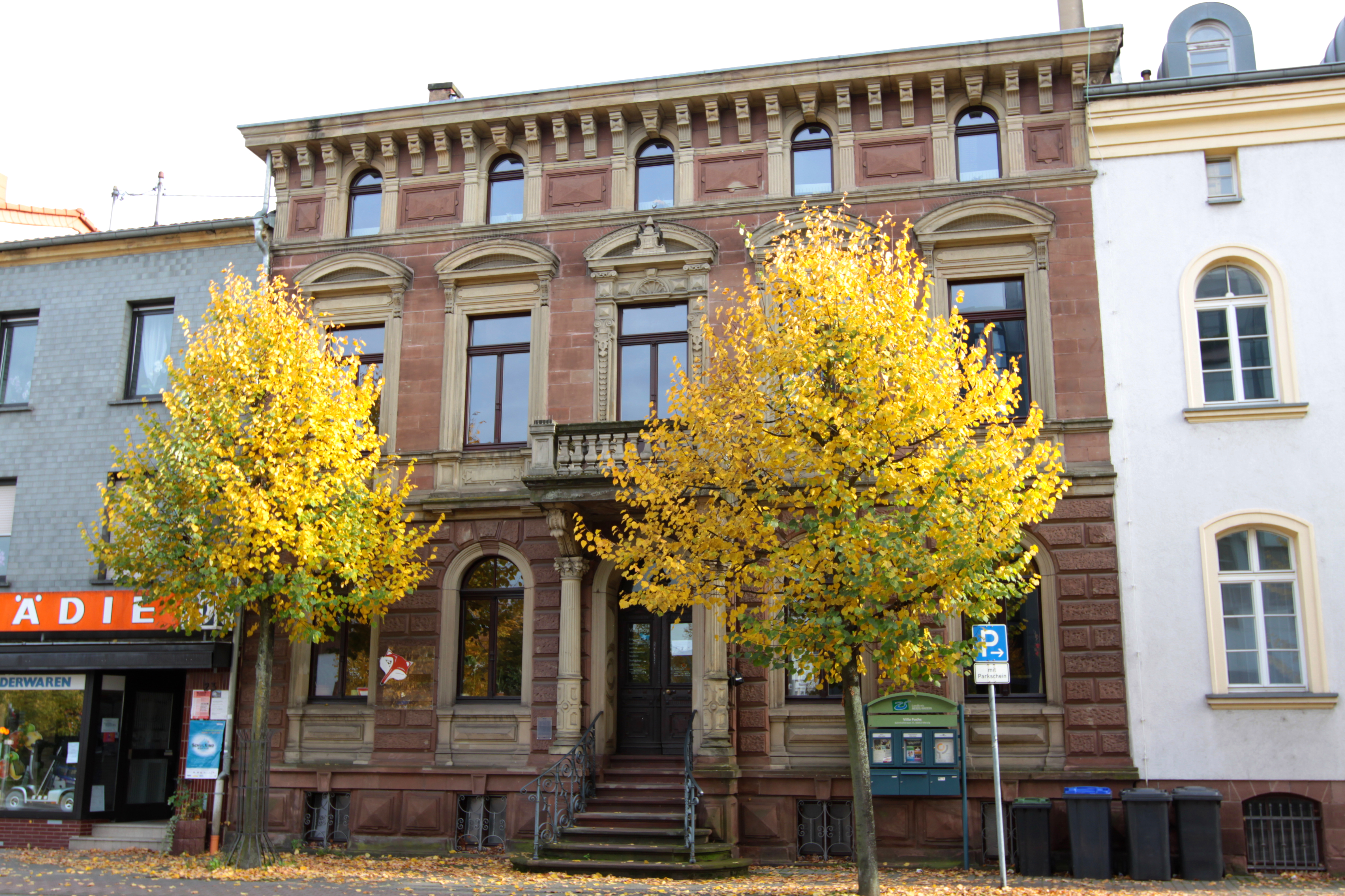 Wohnhaus, Merzig, Bahnhof Straße 25, Baudenkamal